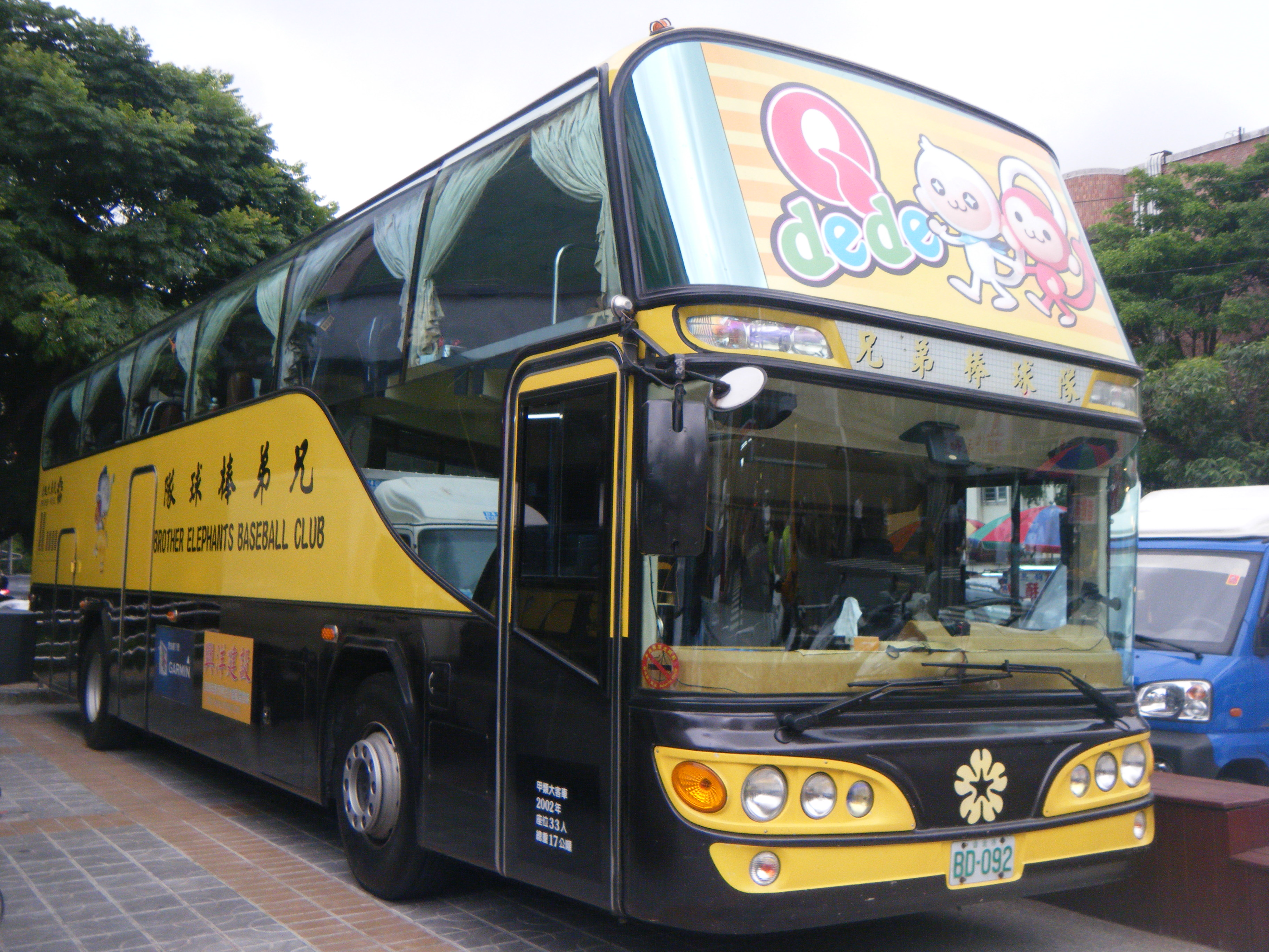 2002年兄弟象遊覽車BD-092。